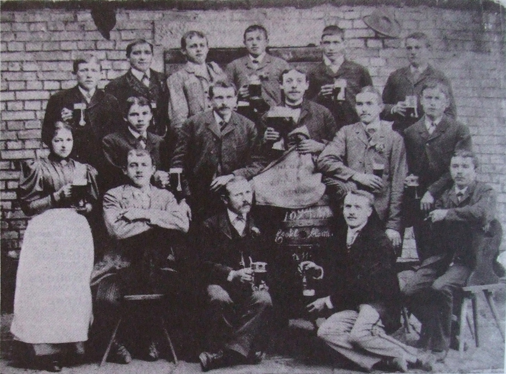 Kerwe in Eschelbronn 1894 beim Gasthaus zur Sonne ("Sunnewirt")